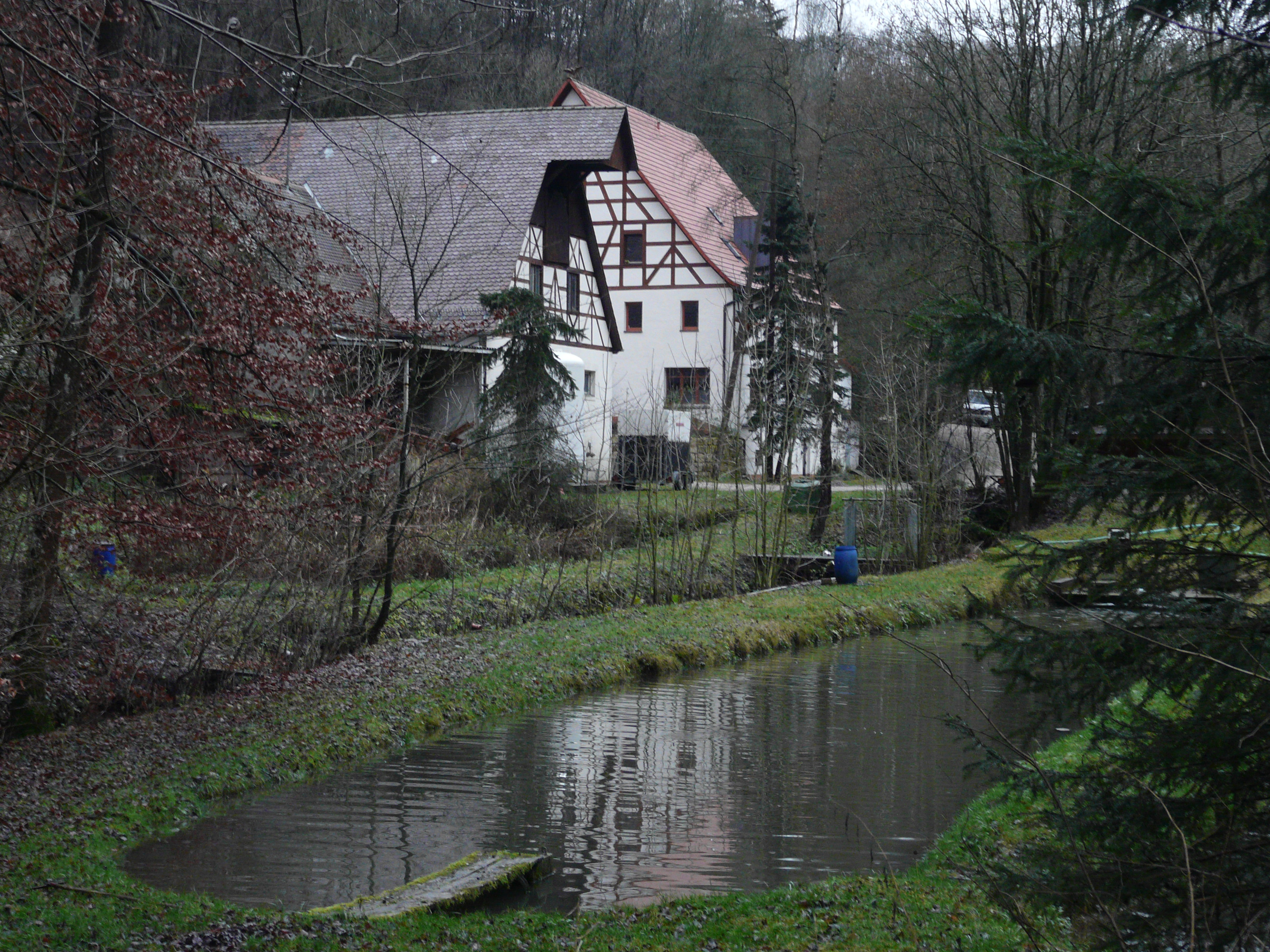 Das Areal der Obermühle im mittelfränkischen Sittenbachtal